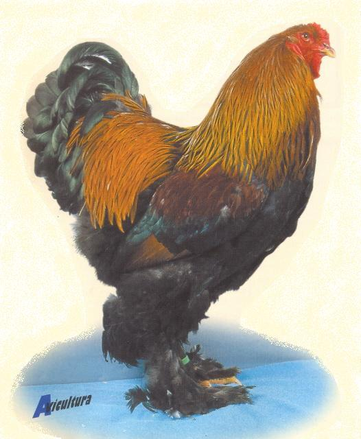 brahma meerzomig patrijs eigen kip op show